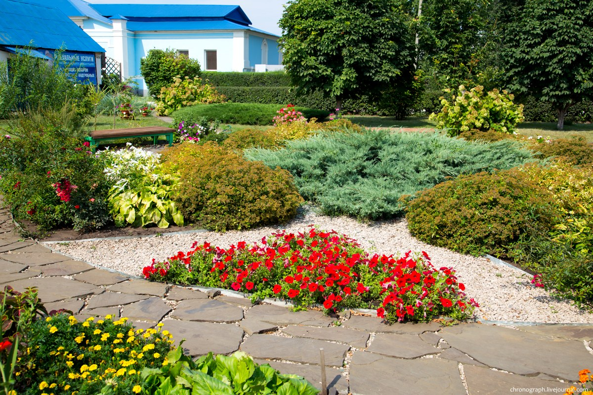 Сад при монастыре. В советское время здесь была свалка. Вознесенский Сызранский мужской монастырь